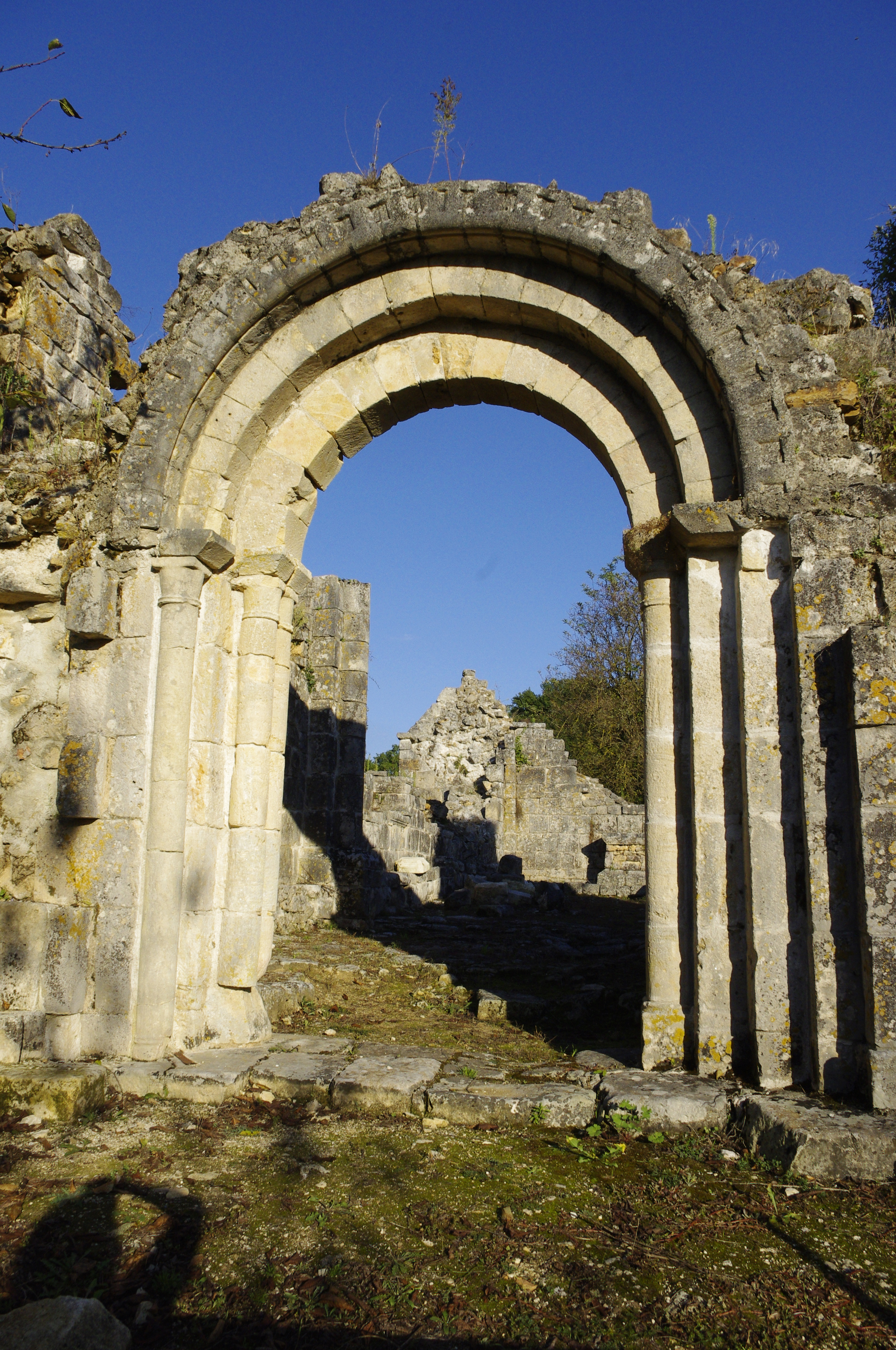 Ruines de l'ancienne chapelle du lieu-dit Fontroubade, commune de Lussas et Nontronneau, Dordogne, France.